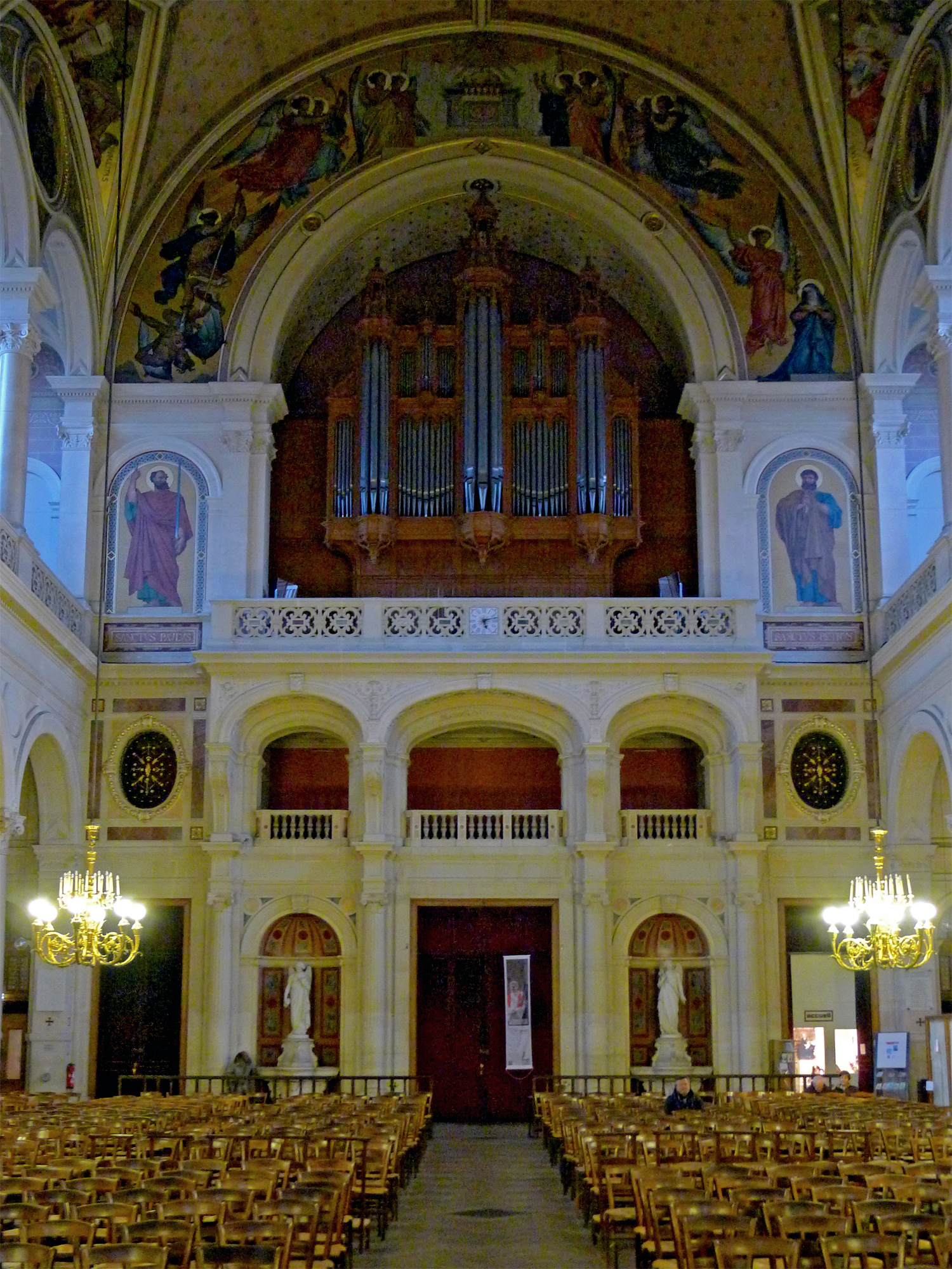 Église de la Sainte-Trinité de Paris (orgue de tribune, vue générale) - Paris IX